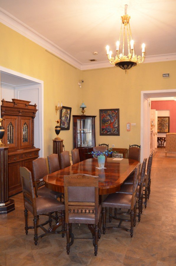 интерьеры Музея мебели в Москве